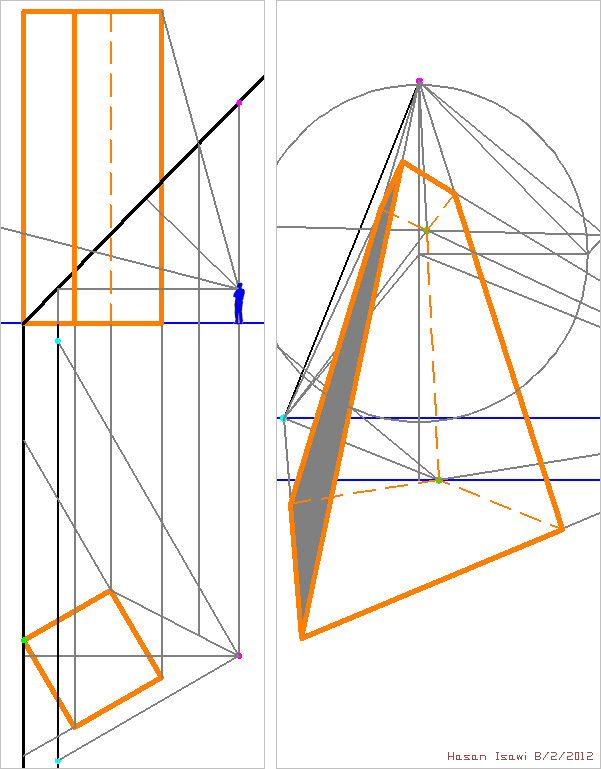 prospettiva a quadro inclinato vista dal basso